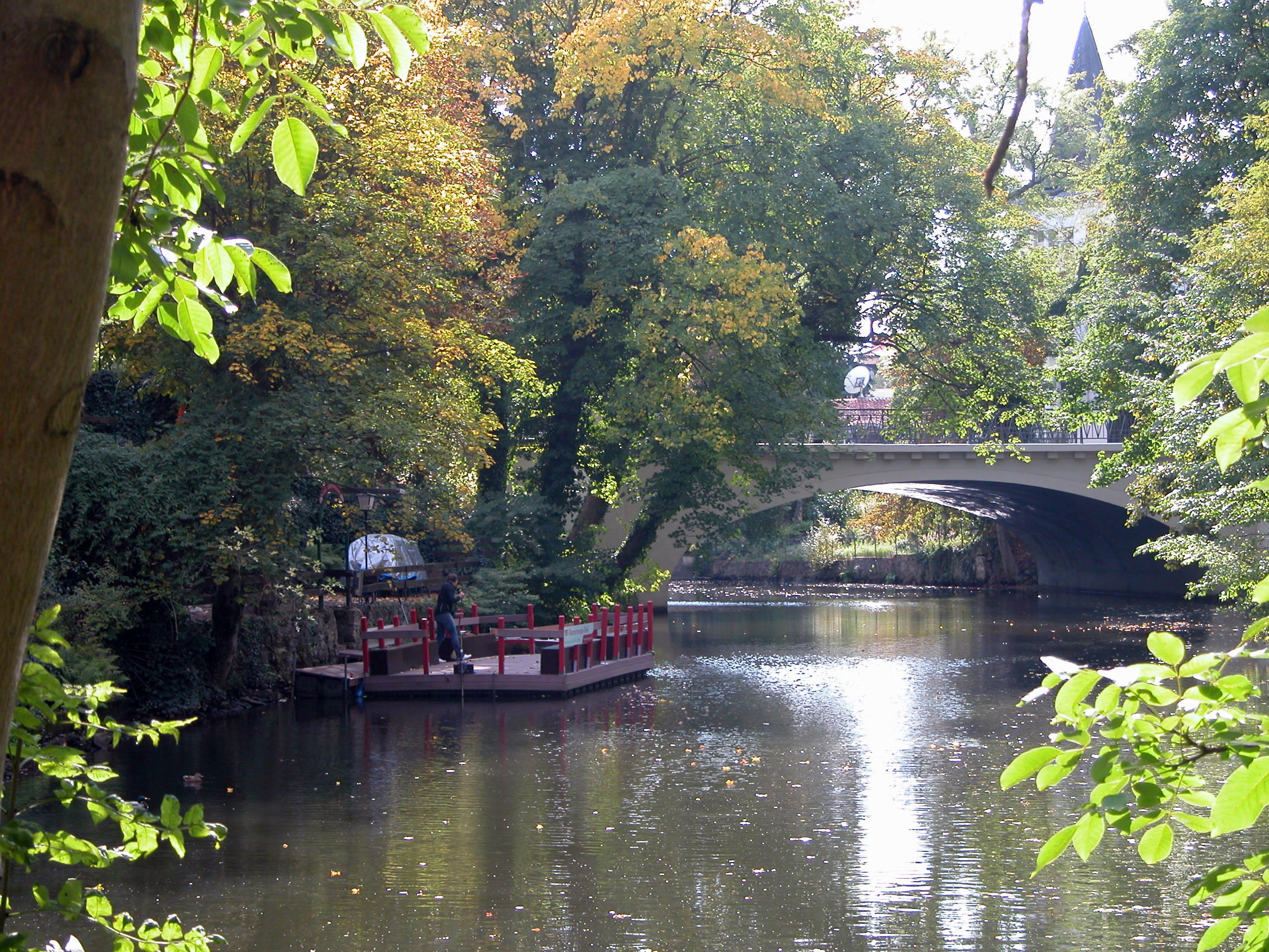 Braunschweig: Steintor-Brücke (nach der Restaurierung).